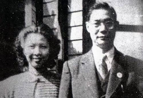 《人民導報》社長宋斐如（右）及其妻區嚴華（左）合照。